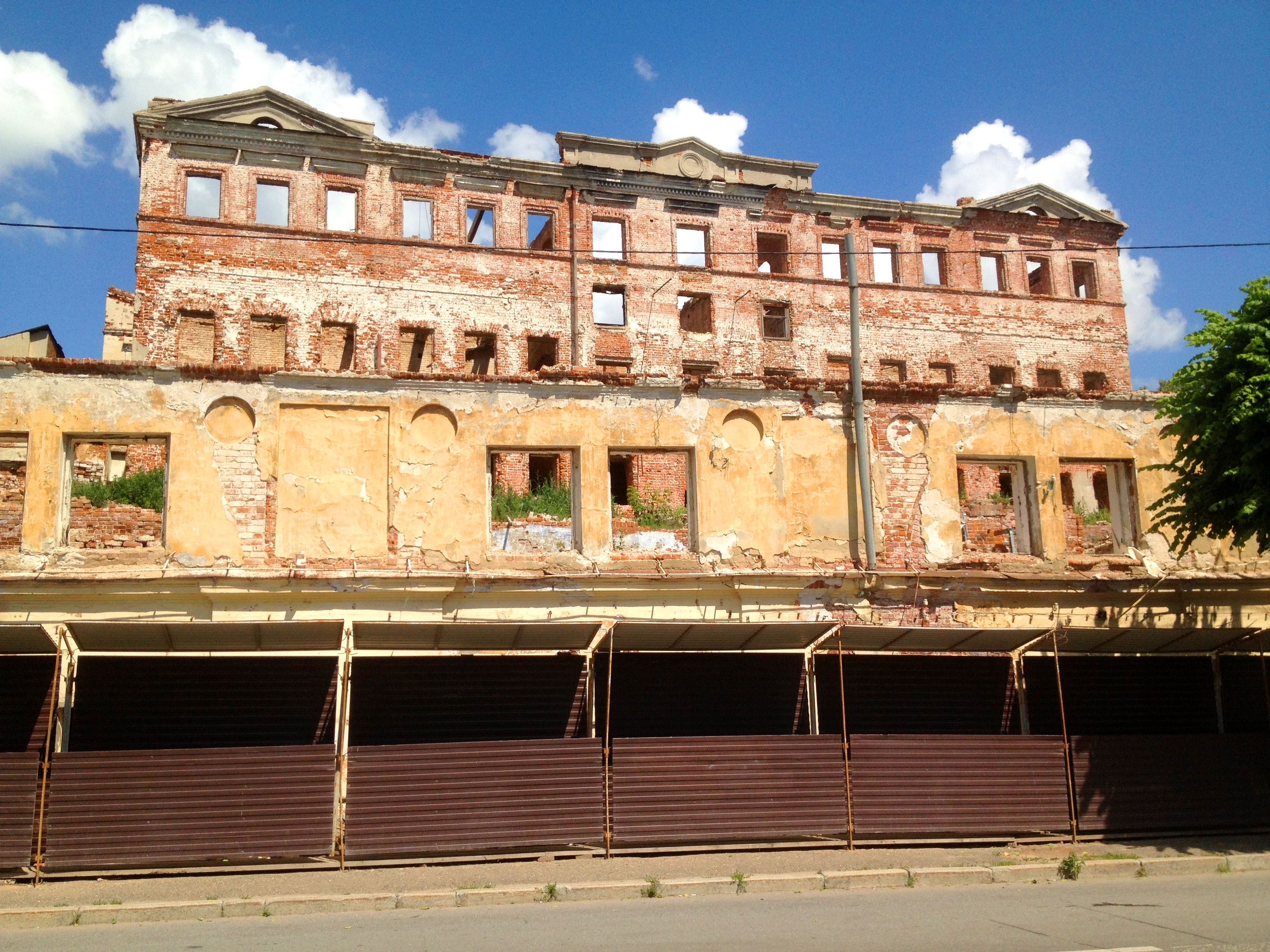 Здание бывшей гостиницы Дворянского собрания (вид с улицы Профсоюзная).